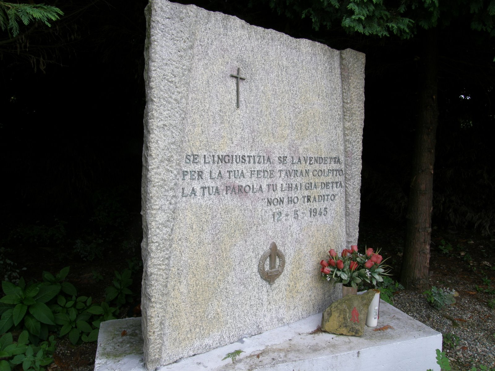 Foto originale di Roberto Nicolik. Concessa liberamente a patto che se ne indichi la provenienza